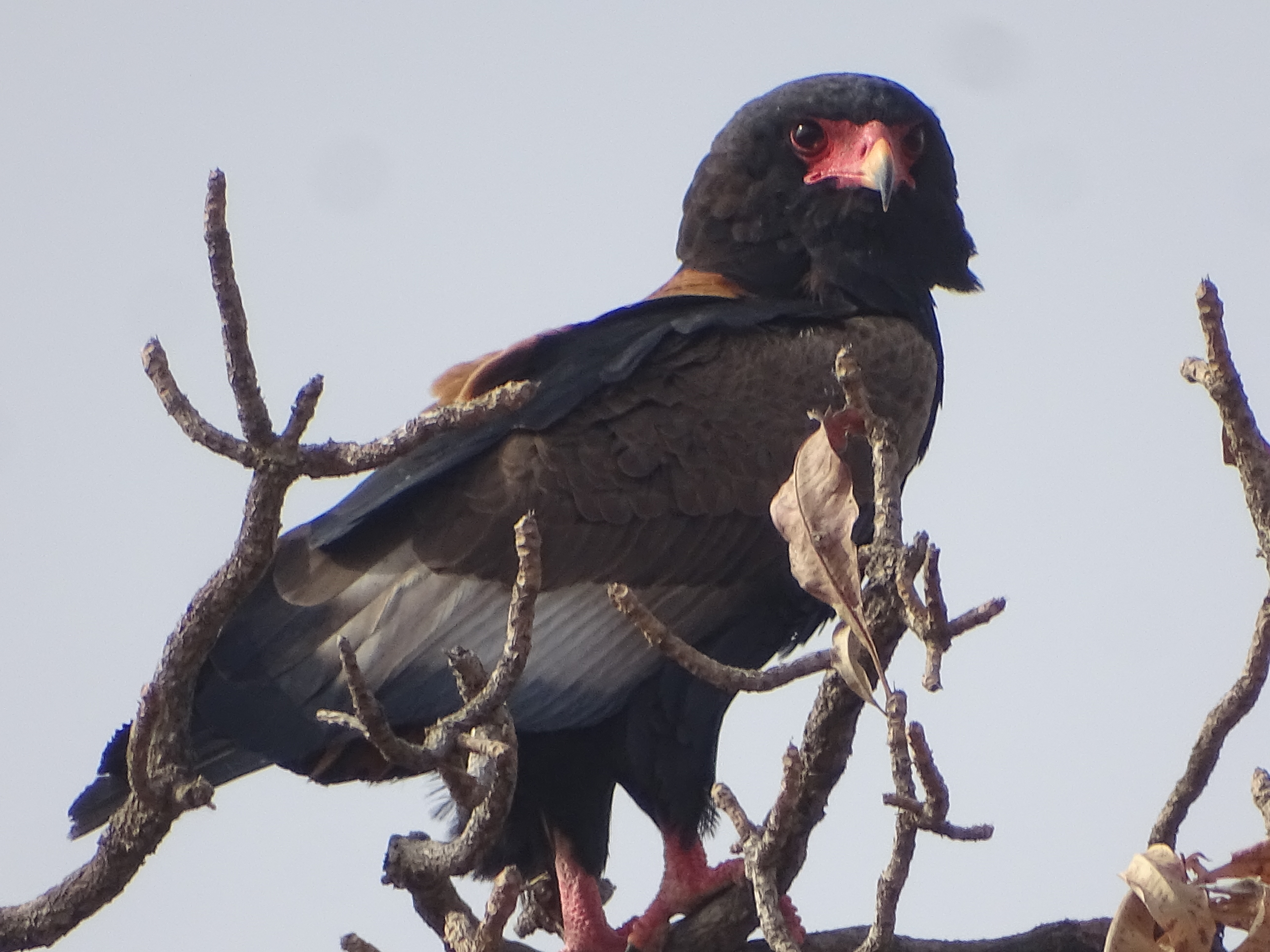 Ce rapace très coloré possède une grosse tête, une queue très courte de 8 à 10 cm et des longues ailes qui lui donnent une silhouette très originale en vol. La tête et le dessous sont noirs. Les ailes sont également noires avec de larges plaques marron-clair à la base sur les épaules. Le dos est roux, la queue marron-roux. Les pattes et la peau nue à la base du bec sont rouge-orange. Enfin, le plumage sur le dessous des ailes est noir et blanc. Dans la classification des espèces, l'aigle bateleur est considéré comme un proche cousin des circaètes. La femelle est légèrement plus grande que le mâle. Elle a les épaules plus grises et les couvertures secondaires gris pâle. Le dessous des ailes est noir et blanc, avec une bordure étroite noire. Celle-ci est beaucoup plus large chez le mâle. Le juvénile est brun-roux clair sur la tête et les parties inférieures. Les parties supérieures sont d'un brun plus foncé. Le dessous des ailes présente une large ou étroite bordure brun foncé, suivant le sexe. Le juvénile et l'immature ont la face gris bleuâtre, ainsi que le bec qui a le bout noir. Les yeux sont bruns. Les pattes et les doigts sont gris bleuâtre clair.